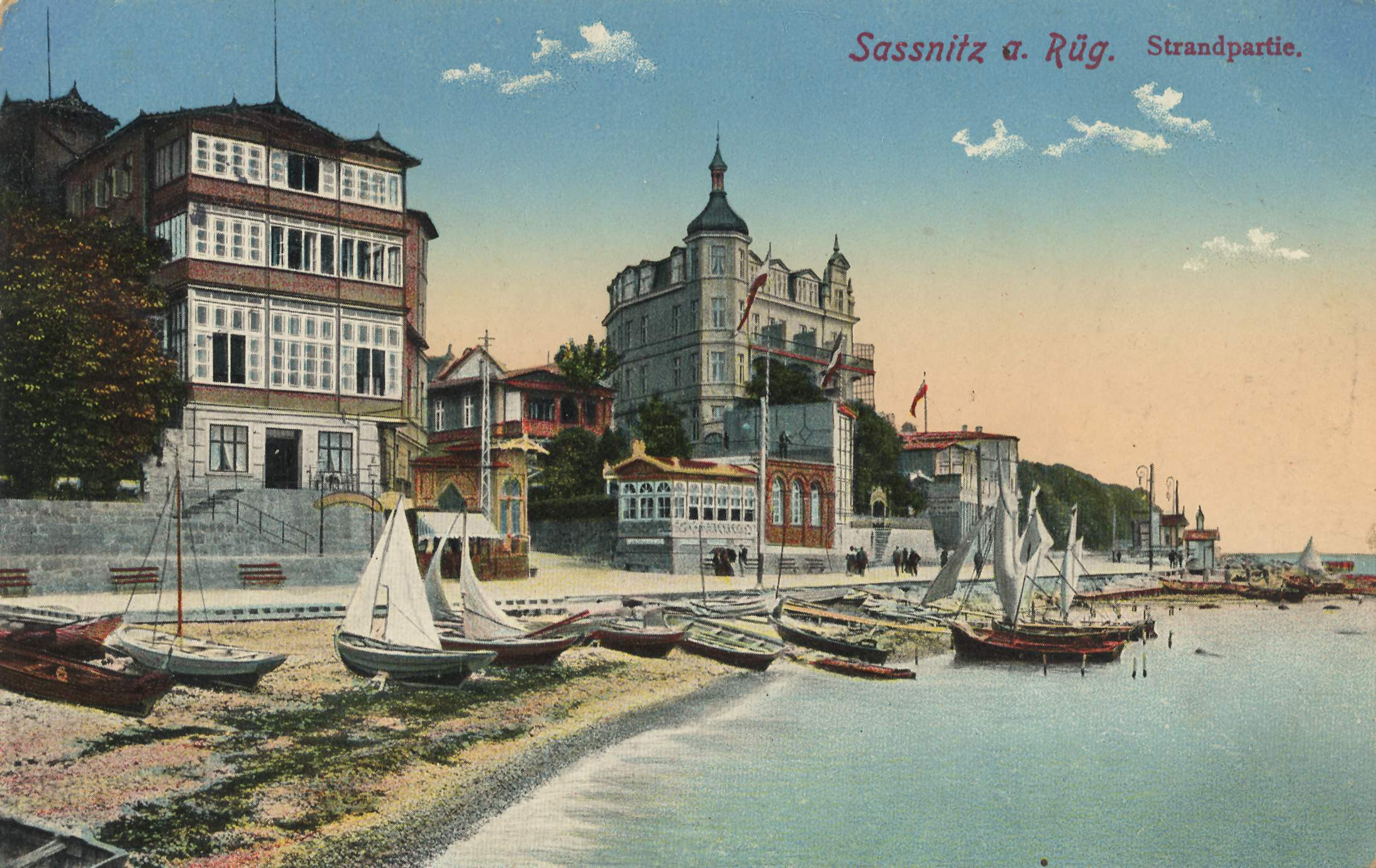 Sassnitz a. Rüg.. Strandpartie.